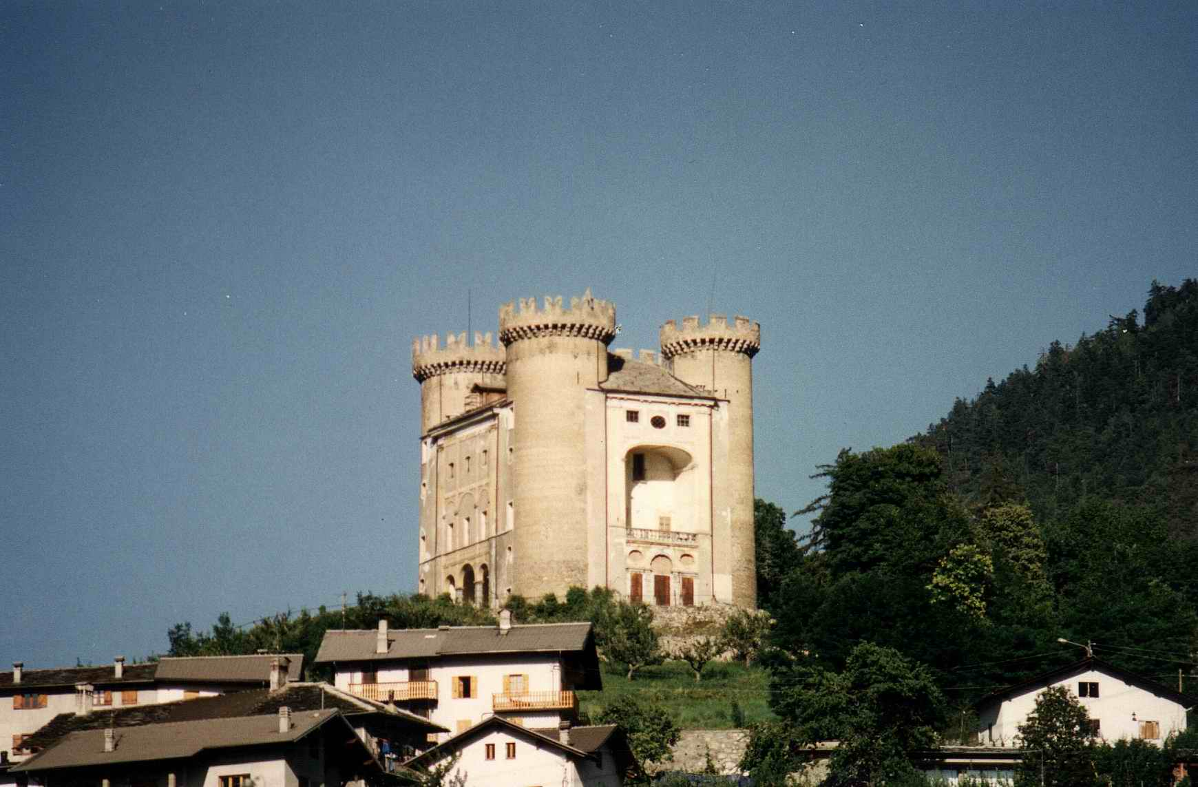 Aymavilles (Aosta - Italia): il Castello